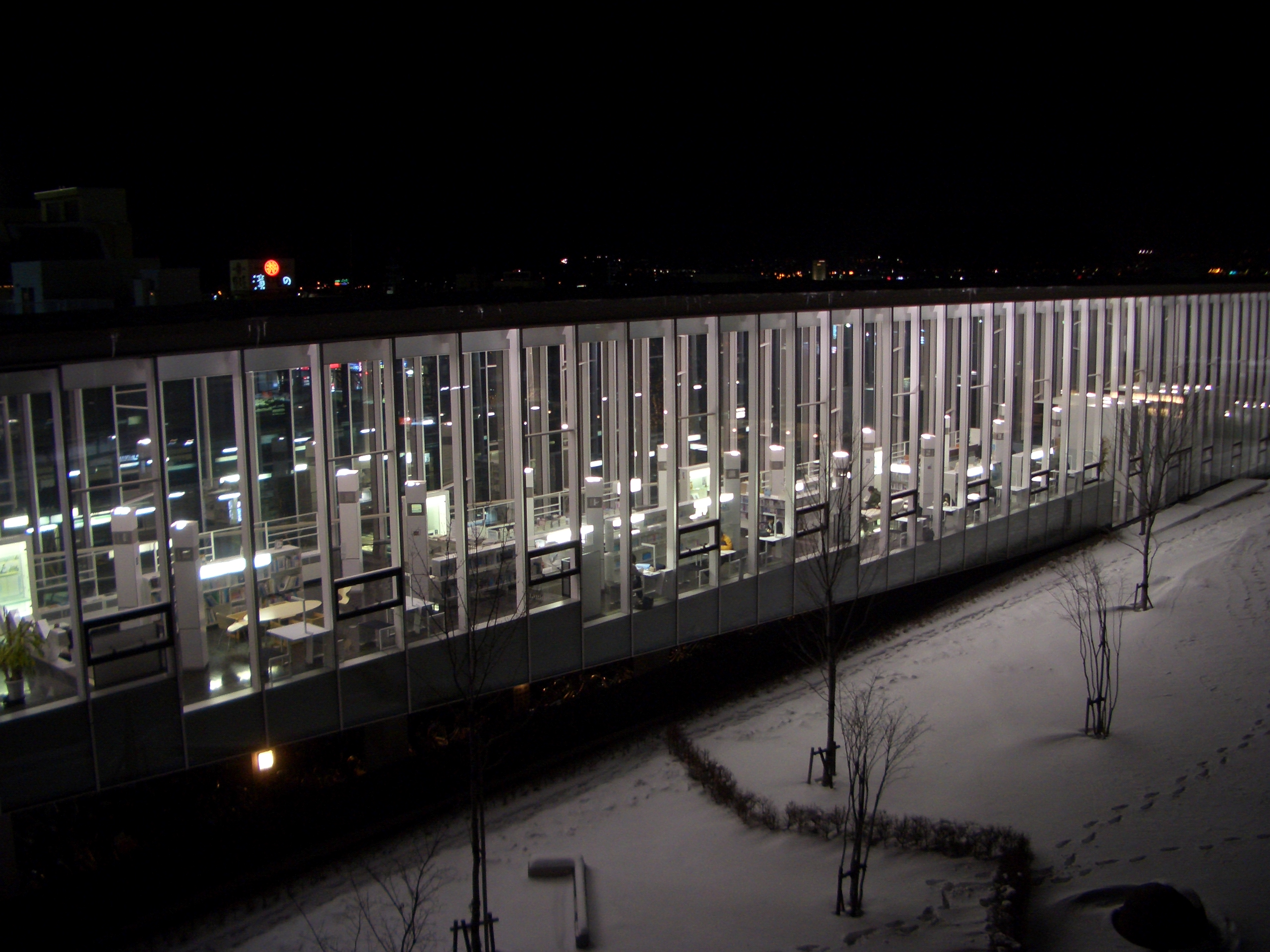 Chino Cultural Complex 茅野市民会館